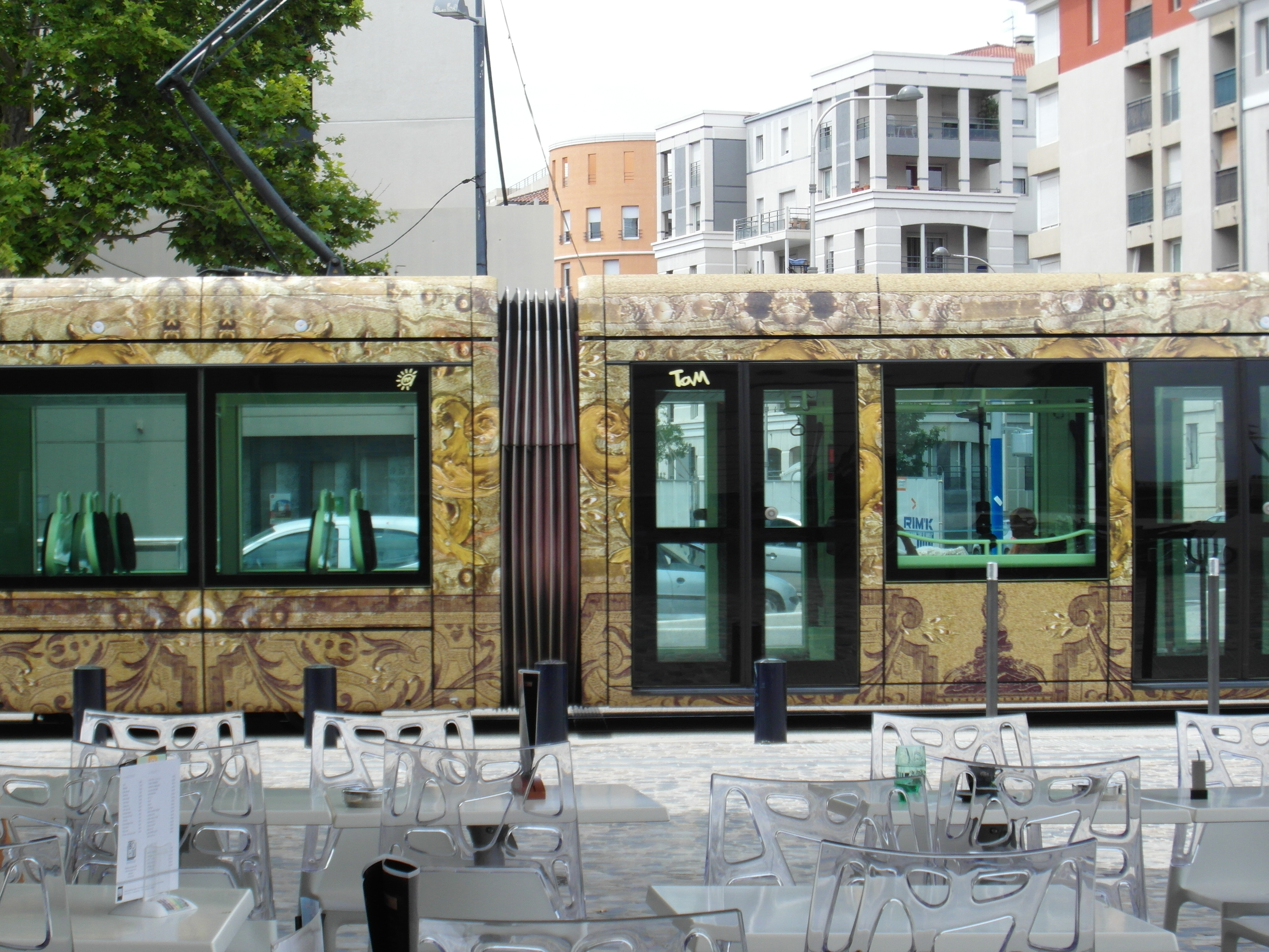 Montpellier - Tramway - Ligne 4 - Hôtel de Ville